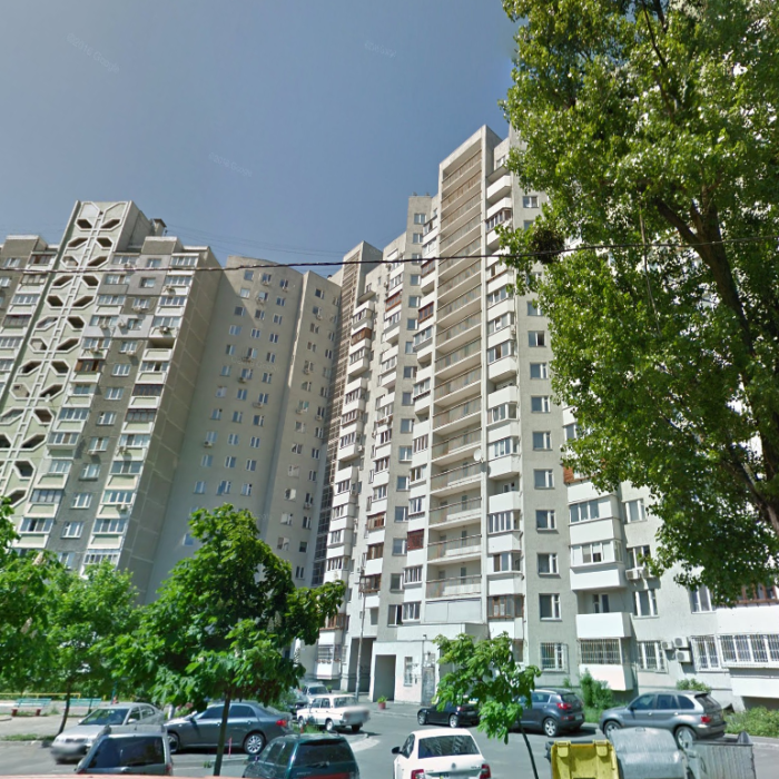 Сосницька 21